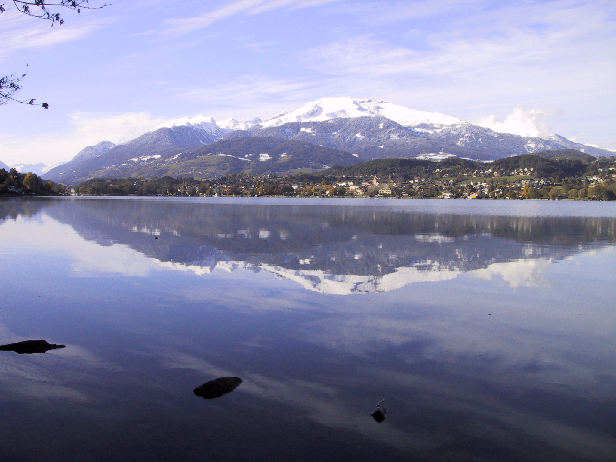 Seeboden mit Gmeineck im Hintergrund und Spiegelung im Millstättersee.